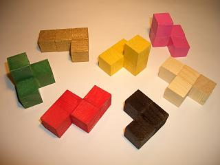 Pieces of a Soma cube puzzle.